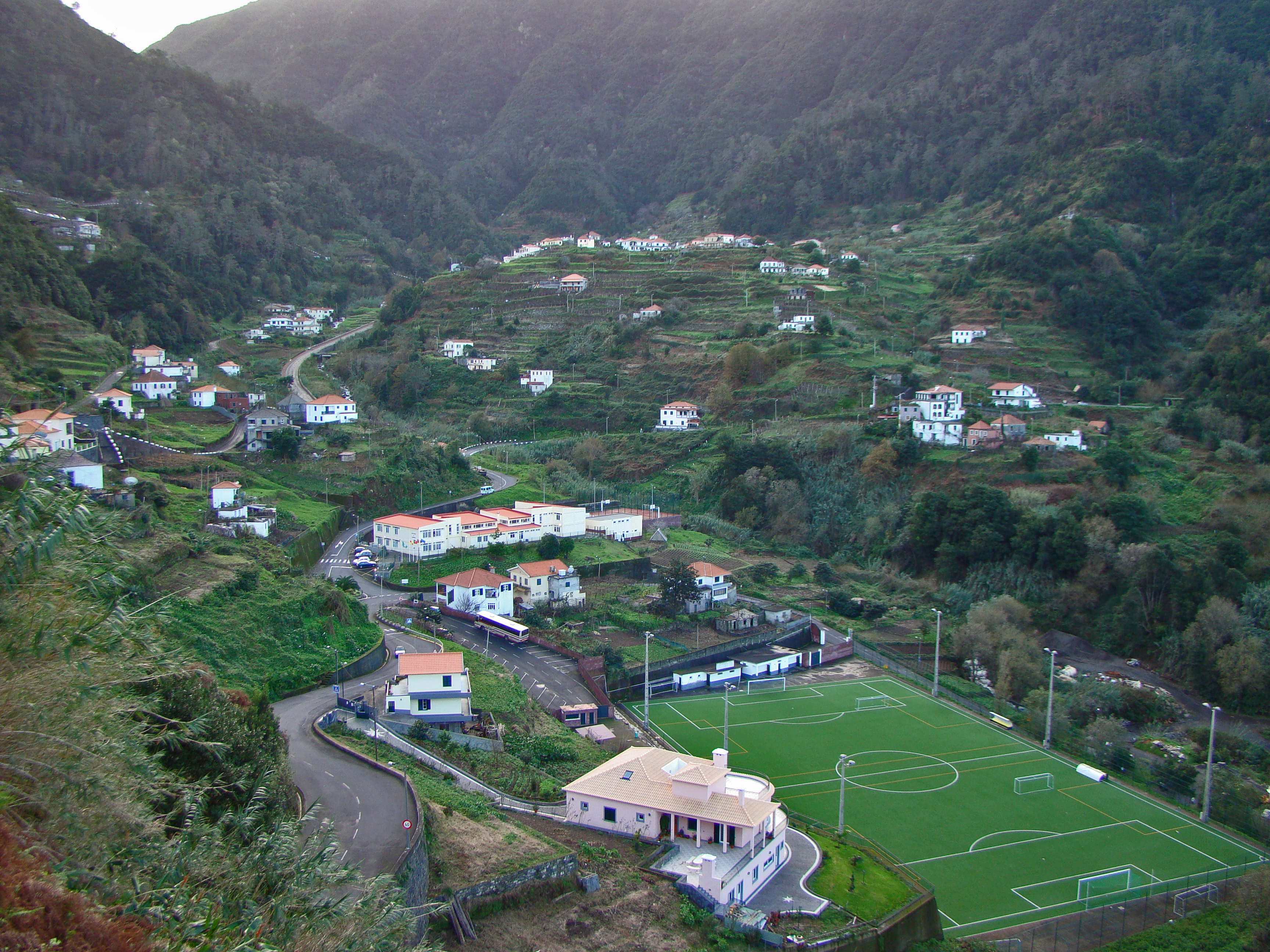 Boaventura, São Vicente